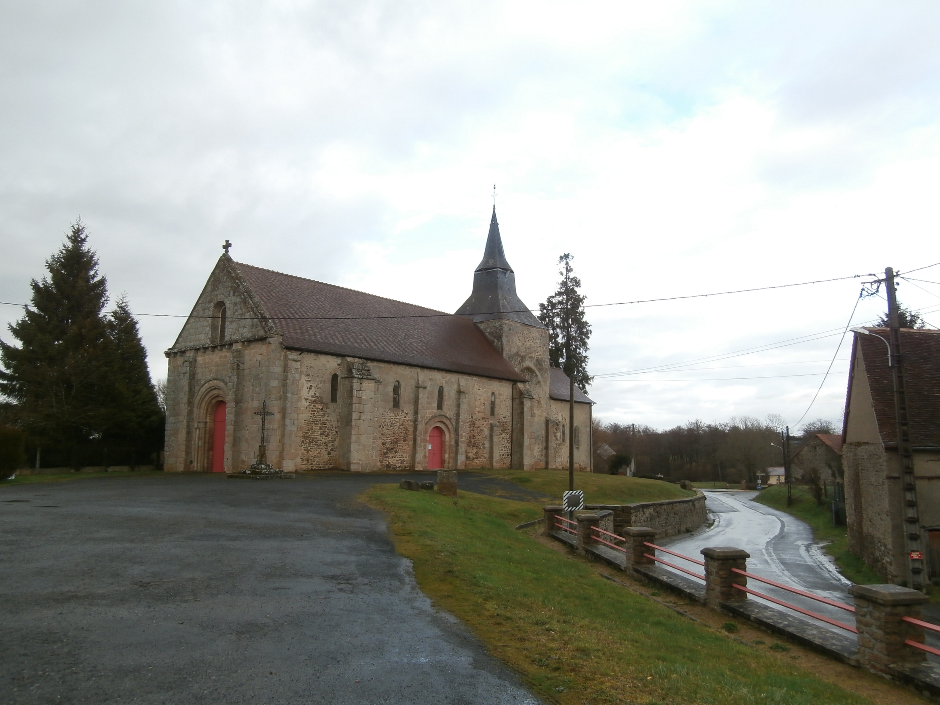 Eglise Saint-Jean de Maison-Feyne (France)